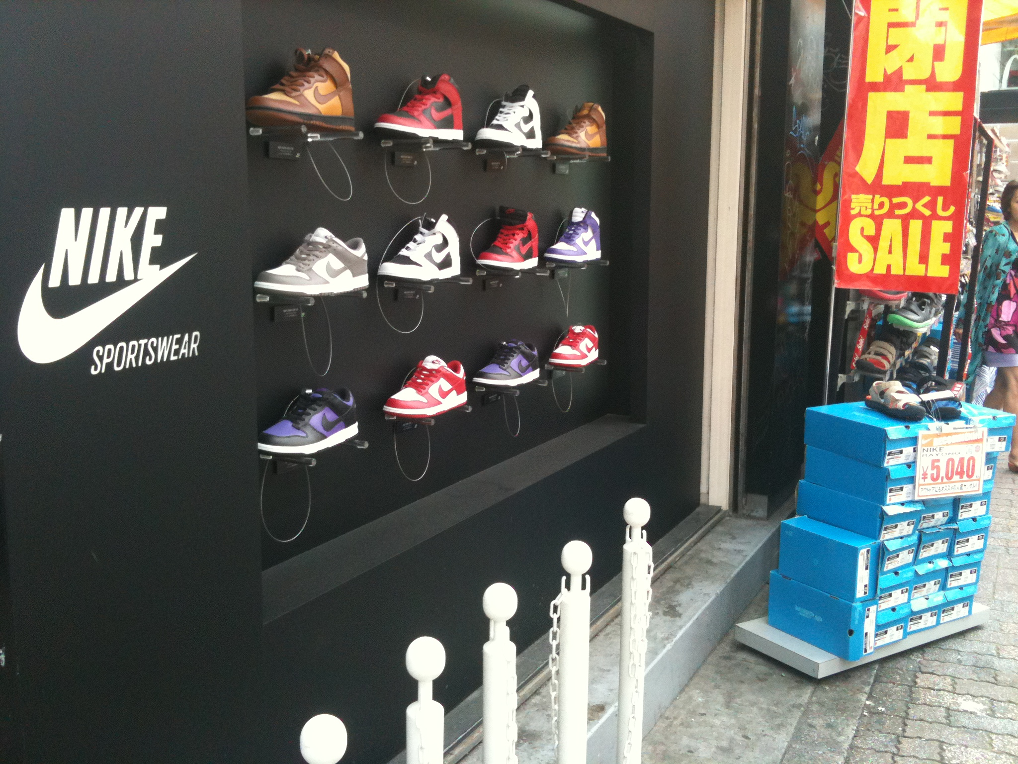 ABC MART, Shibuya